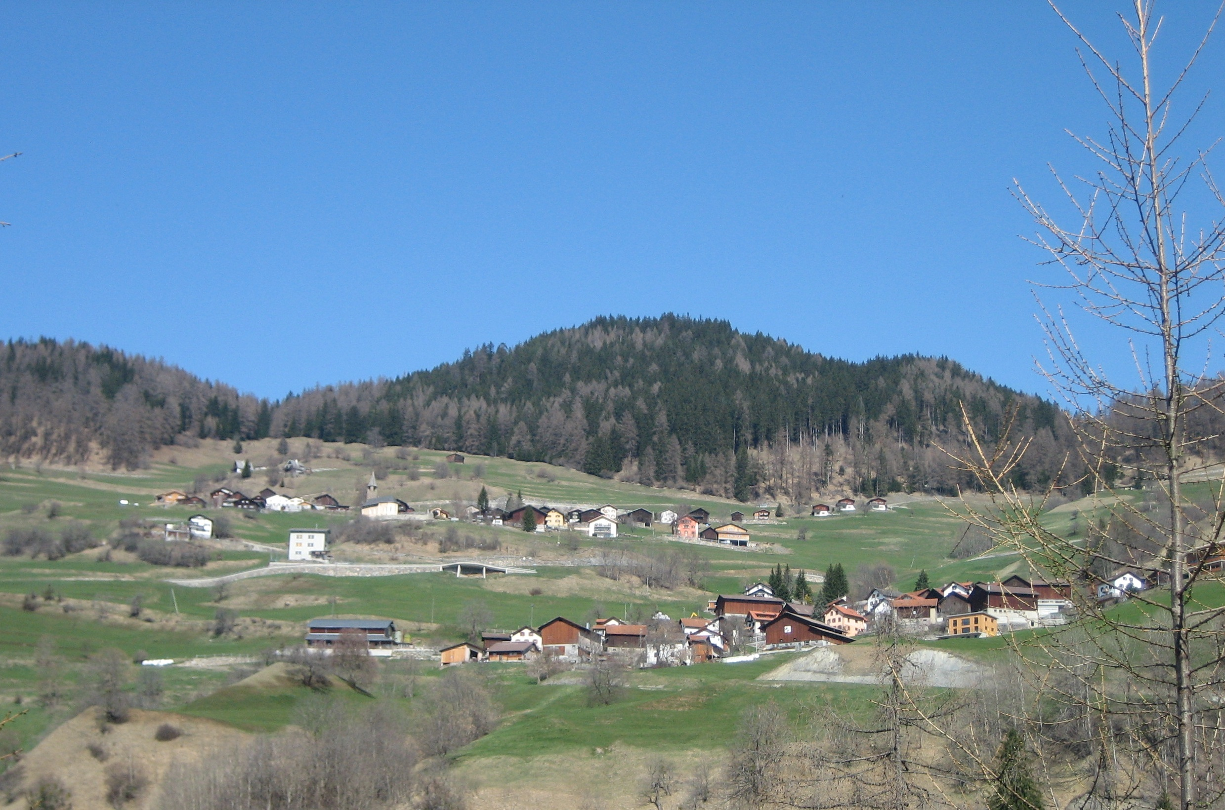 Scheid, Dorf in der G emeinde Tumegl/Tomils